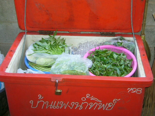 Kühltruhe mit Isolation und Eiswürfeln zur Aufbewahrung verderblicher Lebensmittel (Thailand)